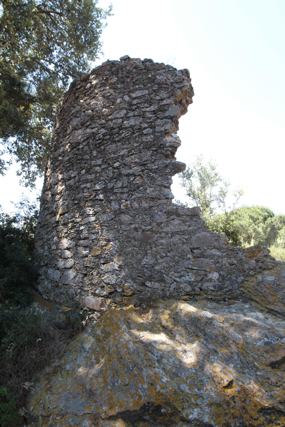 Restes de le tour génoise datant du XVI° siècle, surplombant le sanctuaire d'Aristée.